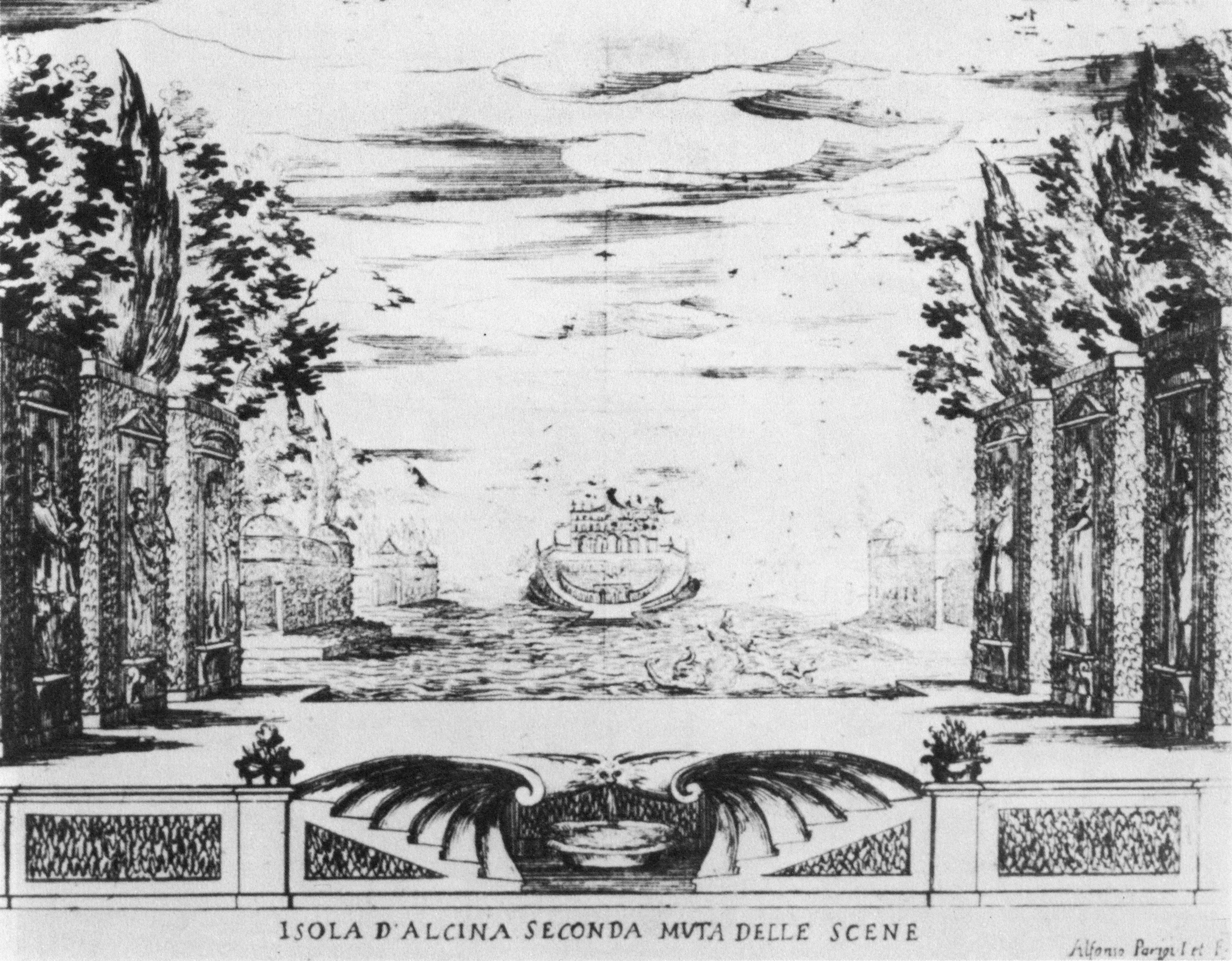 Francesca Caccini - La liberazione di Ruggiero dall'isola d'Alcina - Isola d'Alcina - Seconda muta delle scene - The isle of Alcina